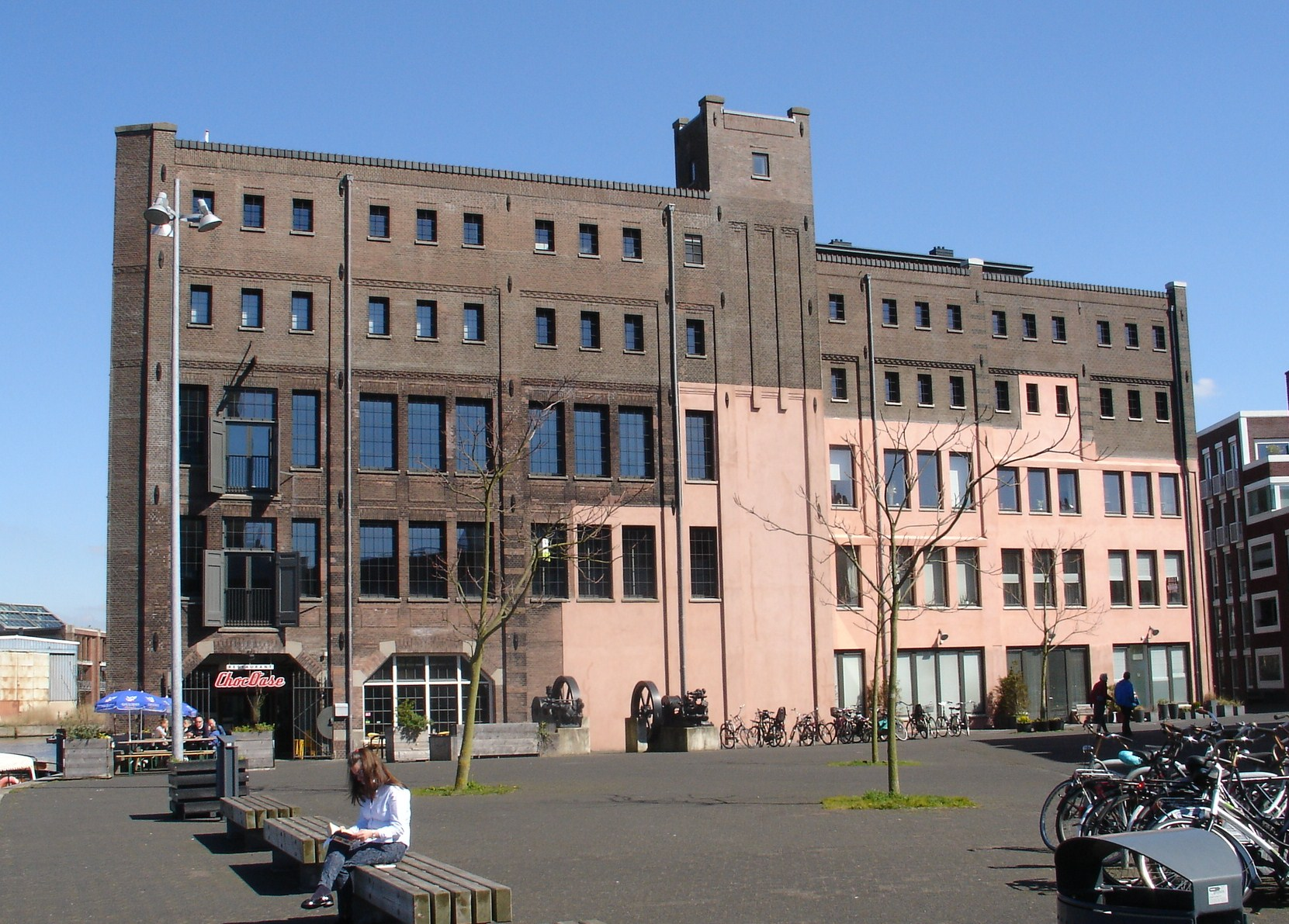 Voormalige Drostefabriek an het Spaarne in Haarlem